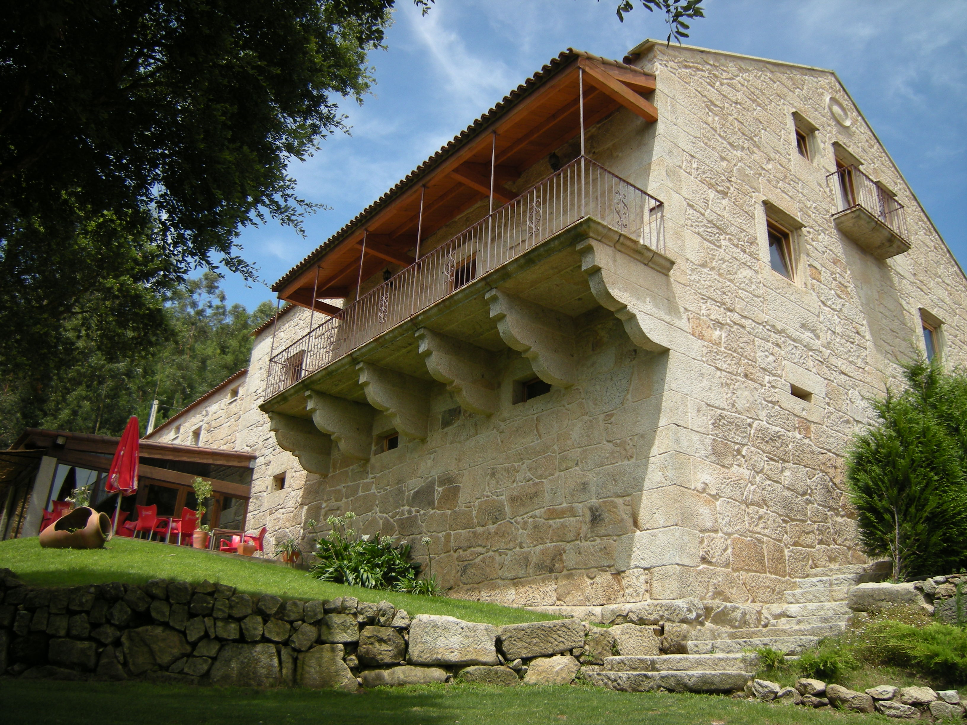 Abadía das Eiras, casa rectoral de 1818, rehabilitada como Casa Rural, dotada de todas las comodidades de hoy en día, en un entorno rural a orillas del río Miño. Esta foto participó en el juego En un lugar de Flickr.